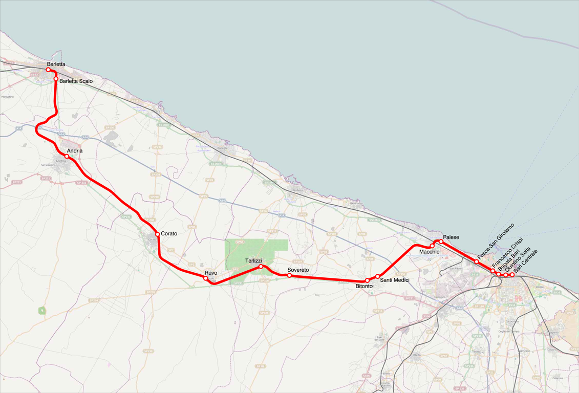 Mappa della ferrovia Bari-Barletta